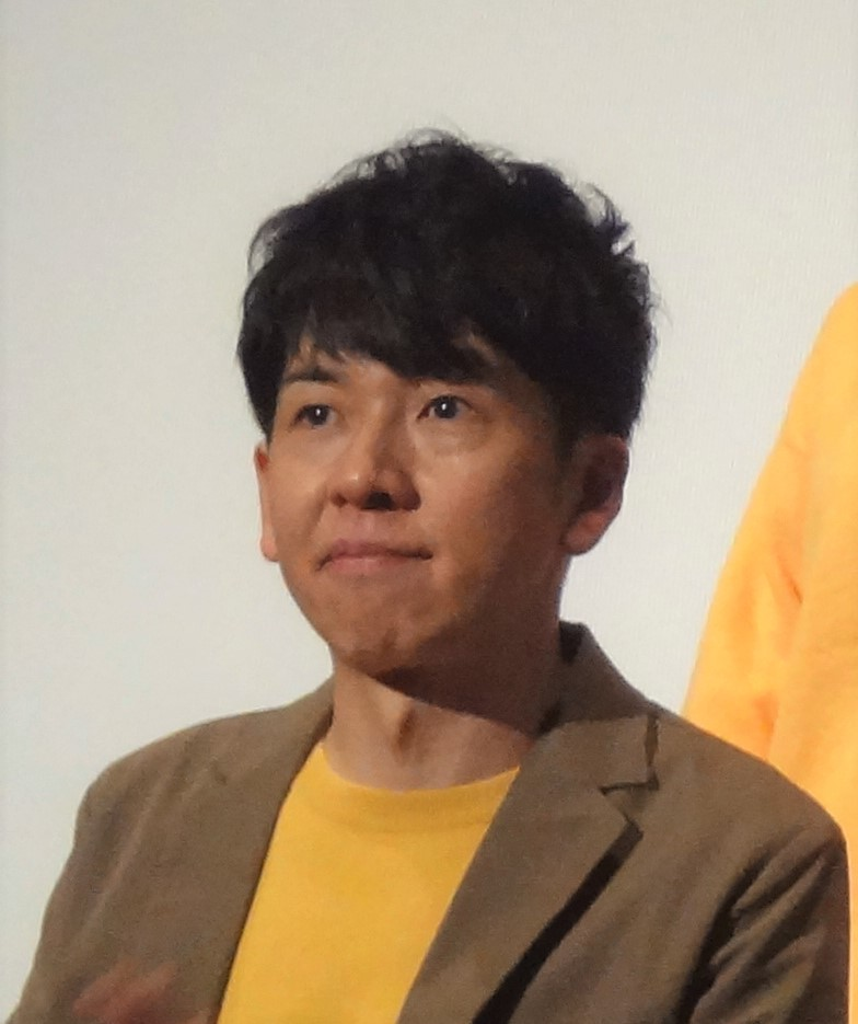 池袋シネマ・ロサにて映画「ミドリムシの夢」の初日舞台挨拶に登壇する監督の真田幹也